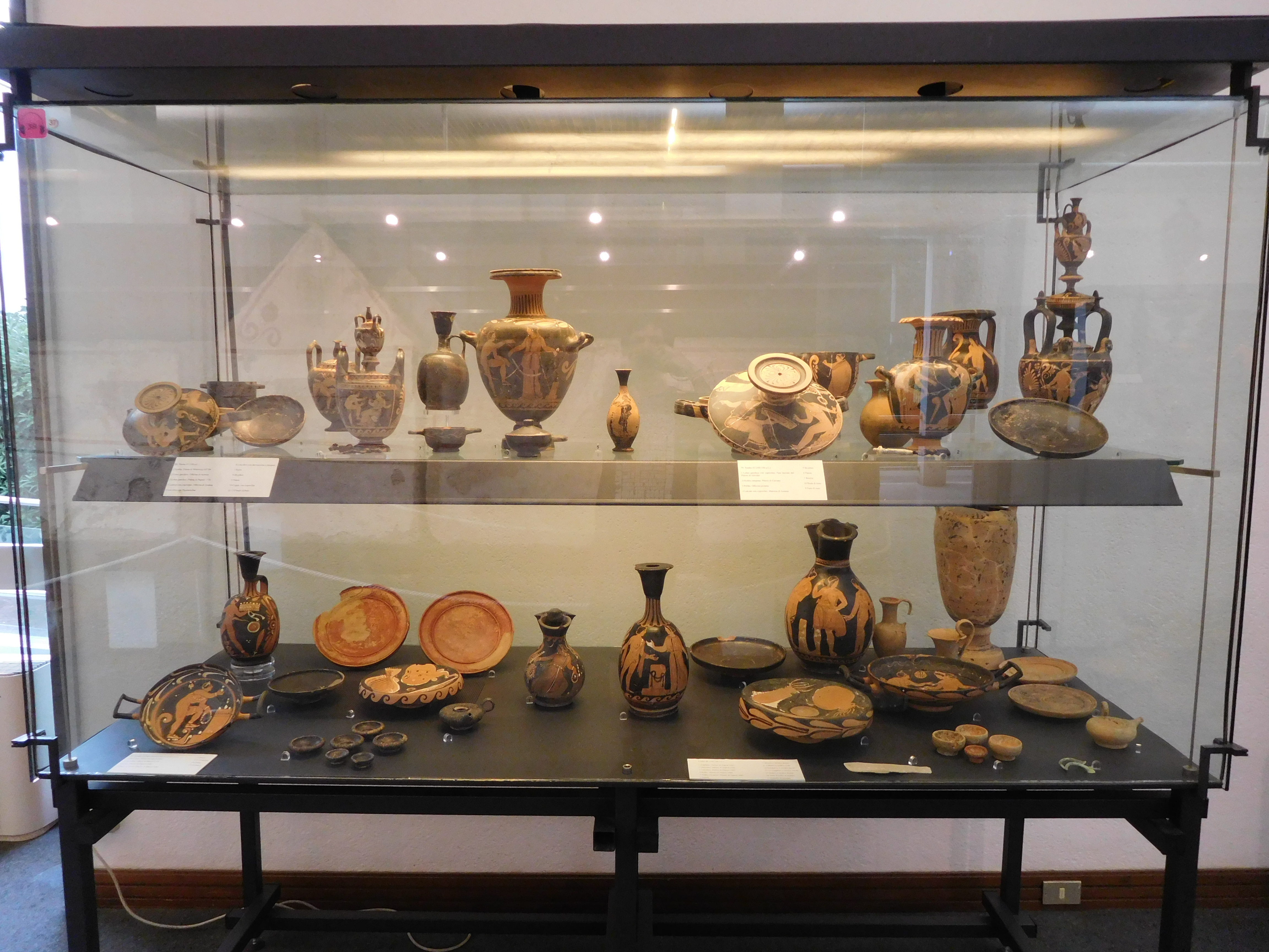 Museo archeologico nazionale, Paestum This is a photo of a monument which is part of cultural heritage of Italy.